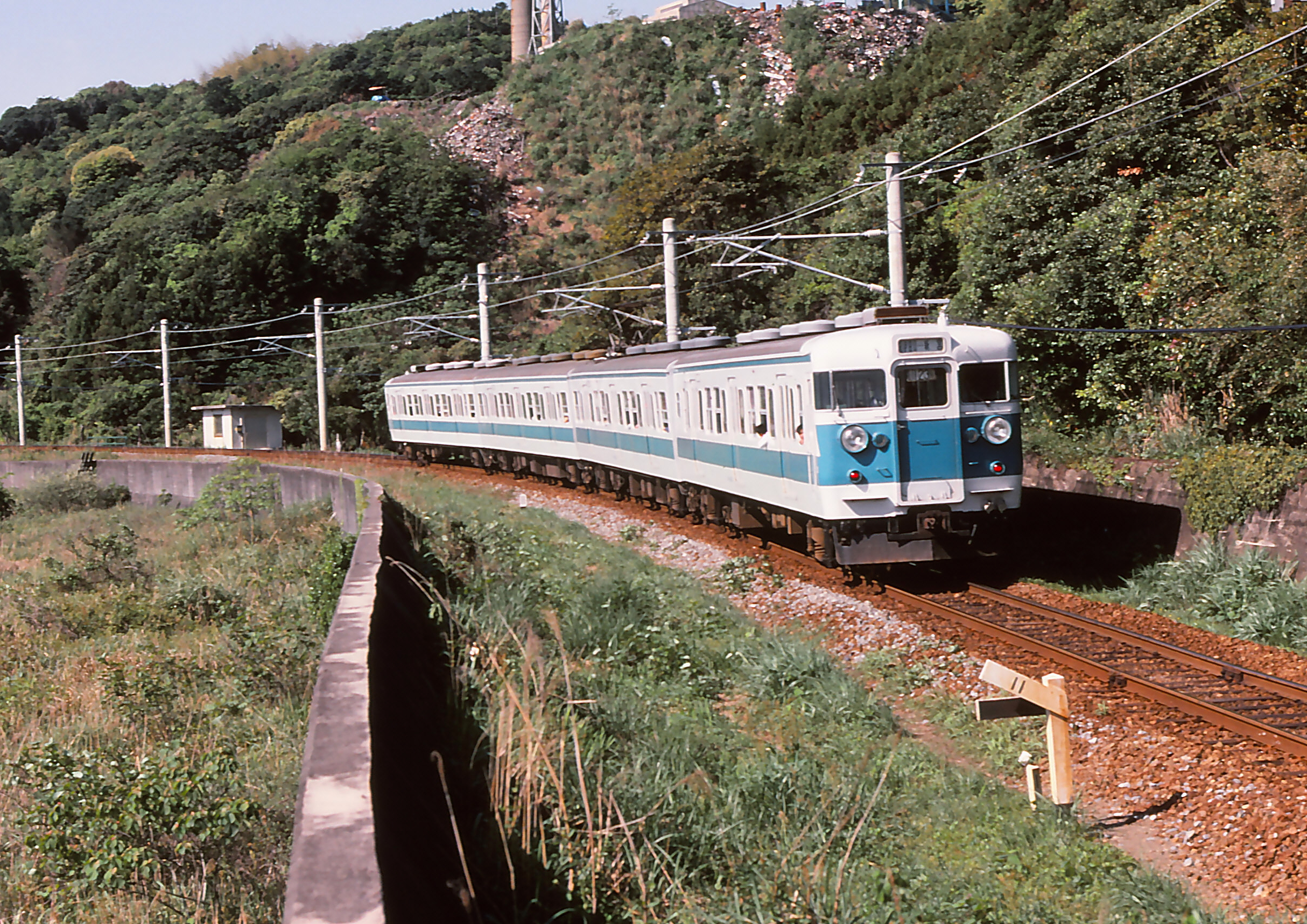 113系 普通列車 和歌山県新宮市